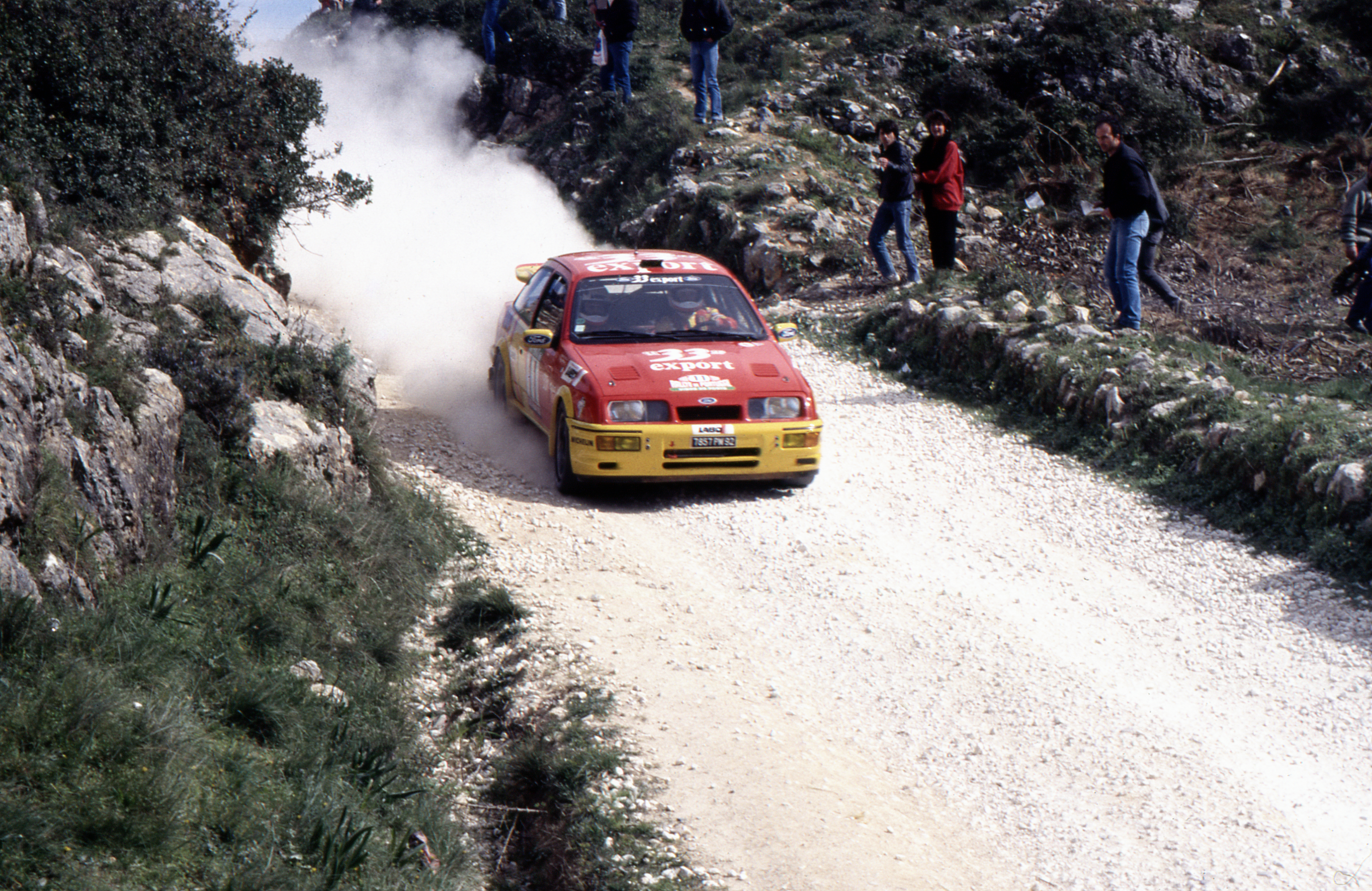 Slide_Agfachrome_Rallye de Portugal_1988_Montejunto_002